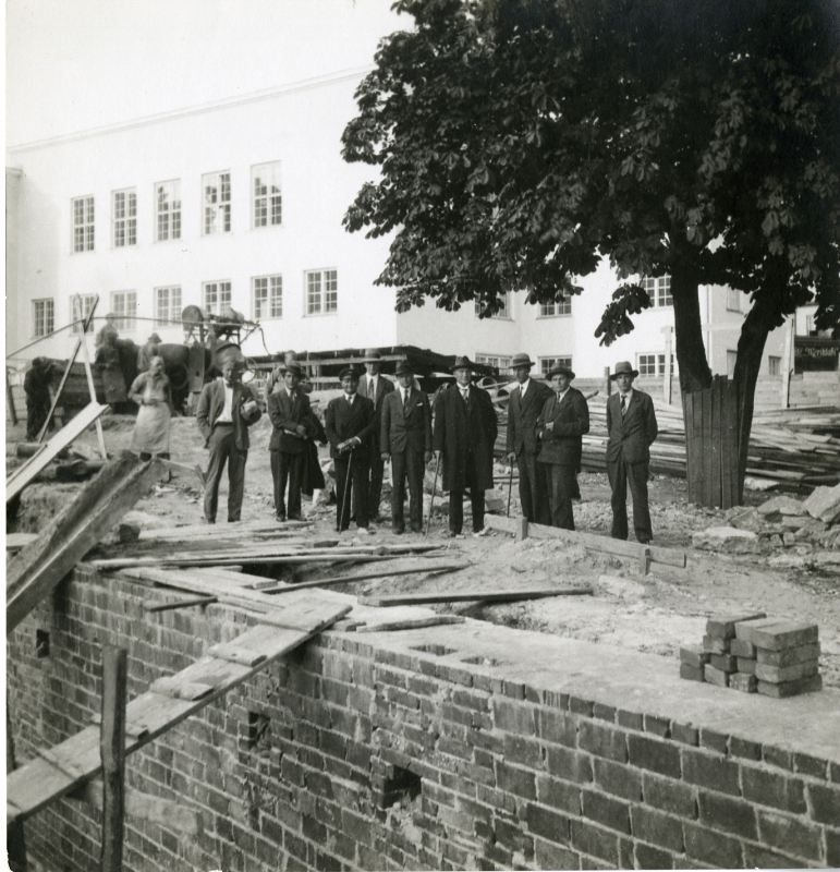 Tallinna Kunstihoone ehitus ja nurgakivi panek.